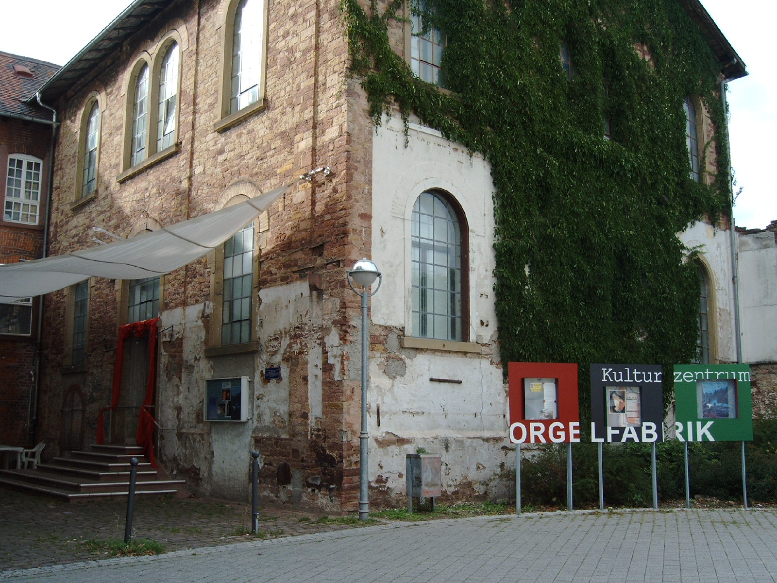 Karlsruhe-Durlach, frühere Orgelfabrik Heinrich Voit & Söhne